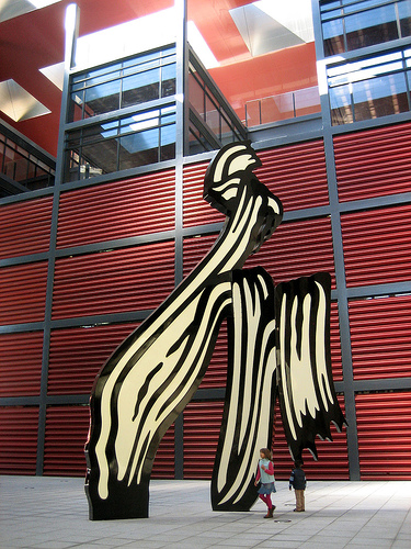 cours du musée reina sofia